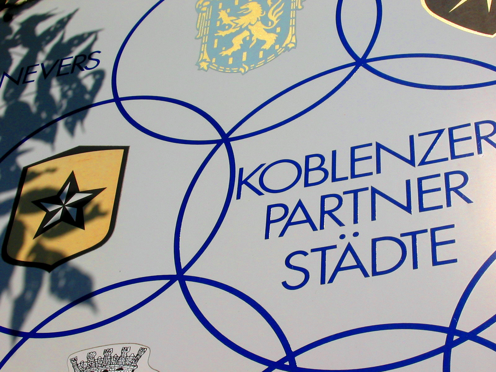 Coblence (Allemagne) - Panneau des jumelages à l'entrée du pont sur le Rhin. Je suis l'auteur du cliché pris en août 2004